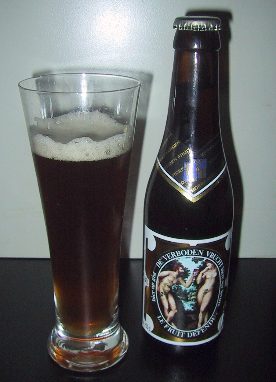 Hoegaarden - Verboden Vrucht (Belgium).